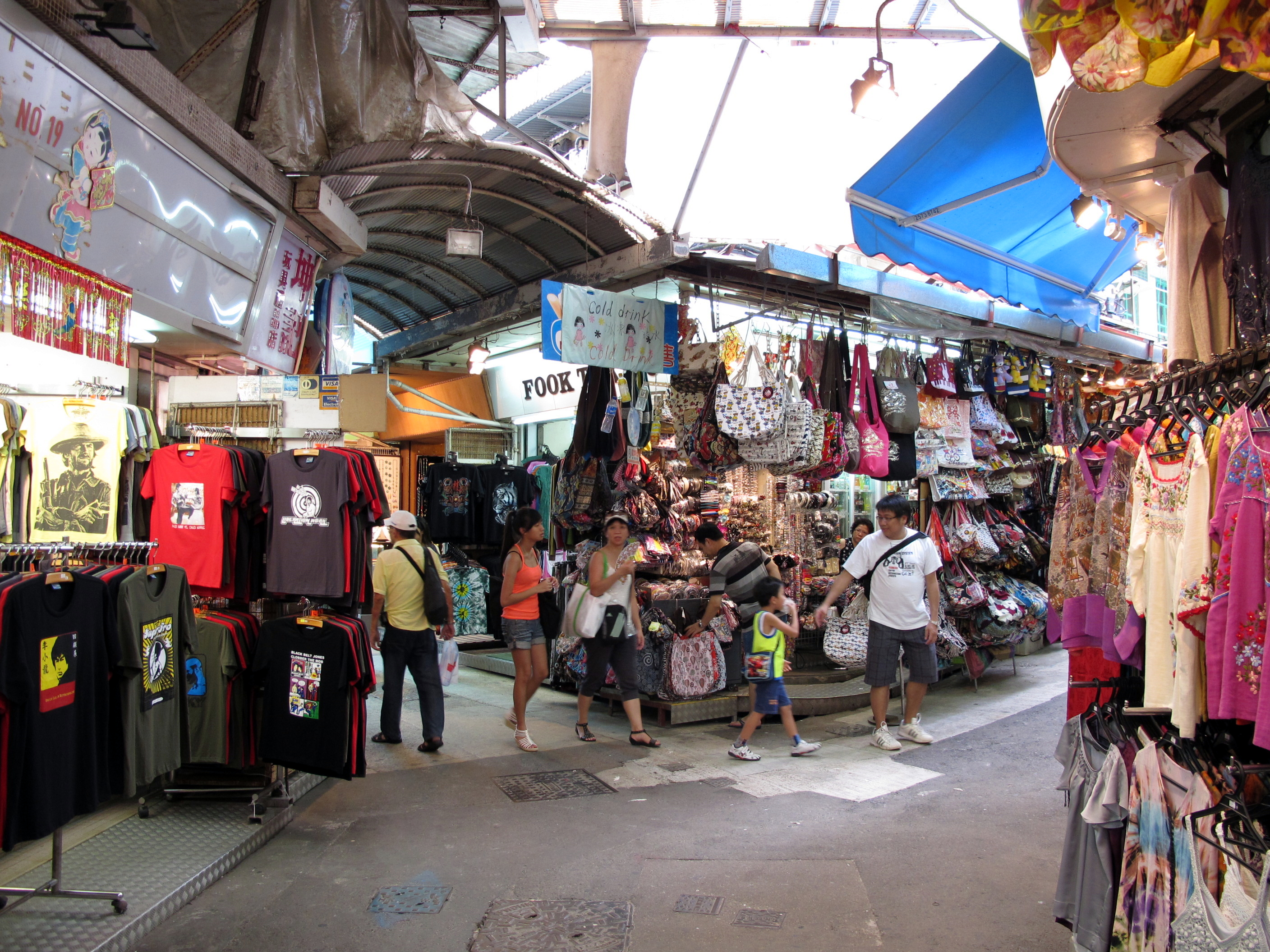 Stanley Market 赤柱市集